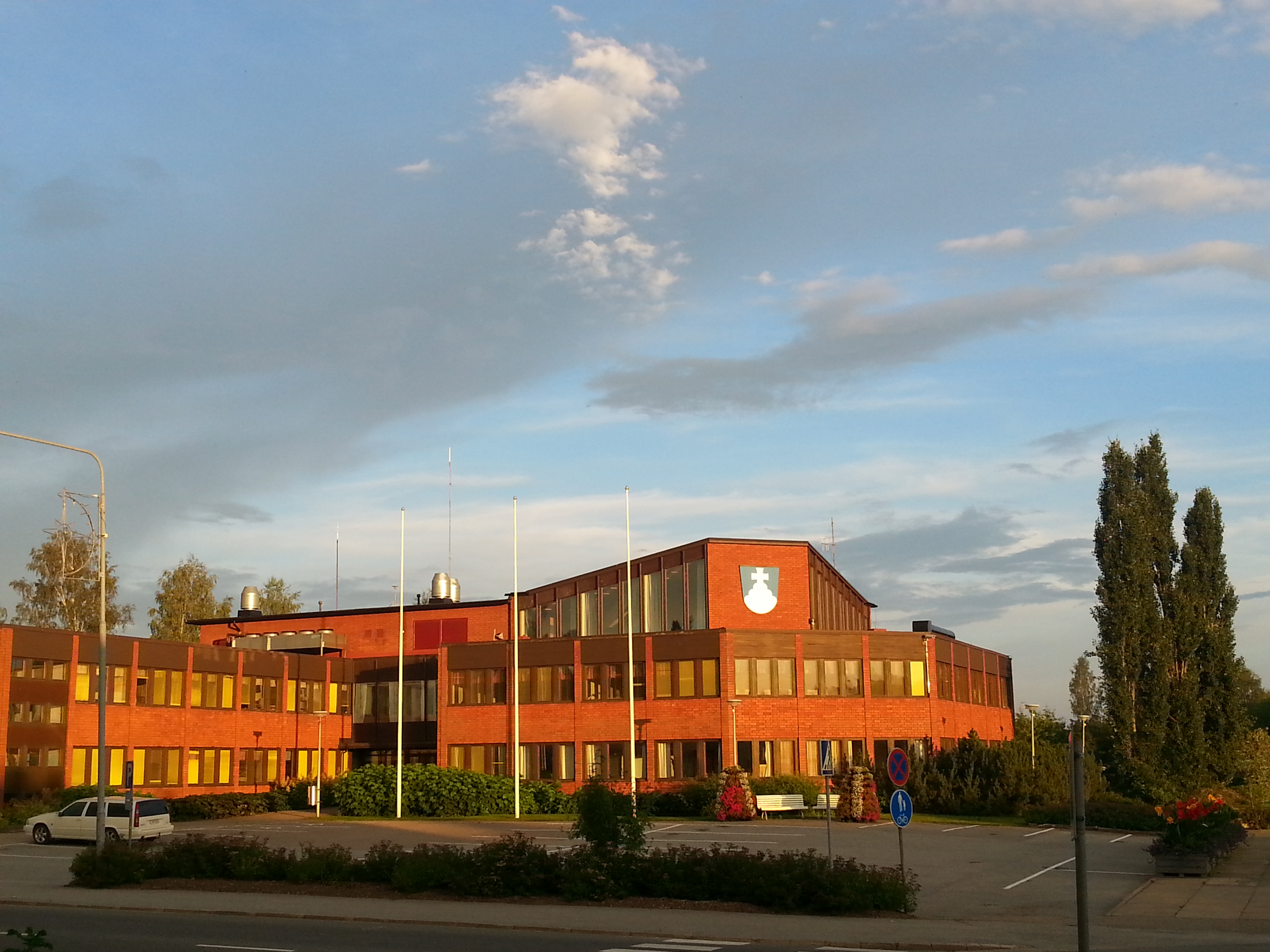 Alavuden kaupungintalo kesällä 2014